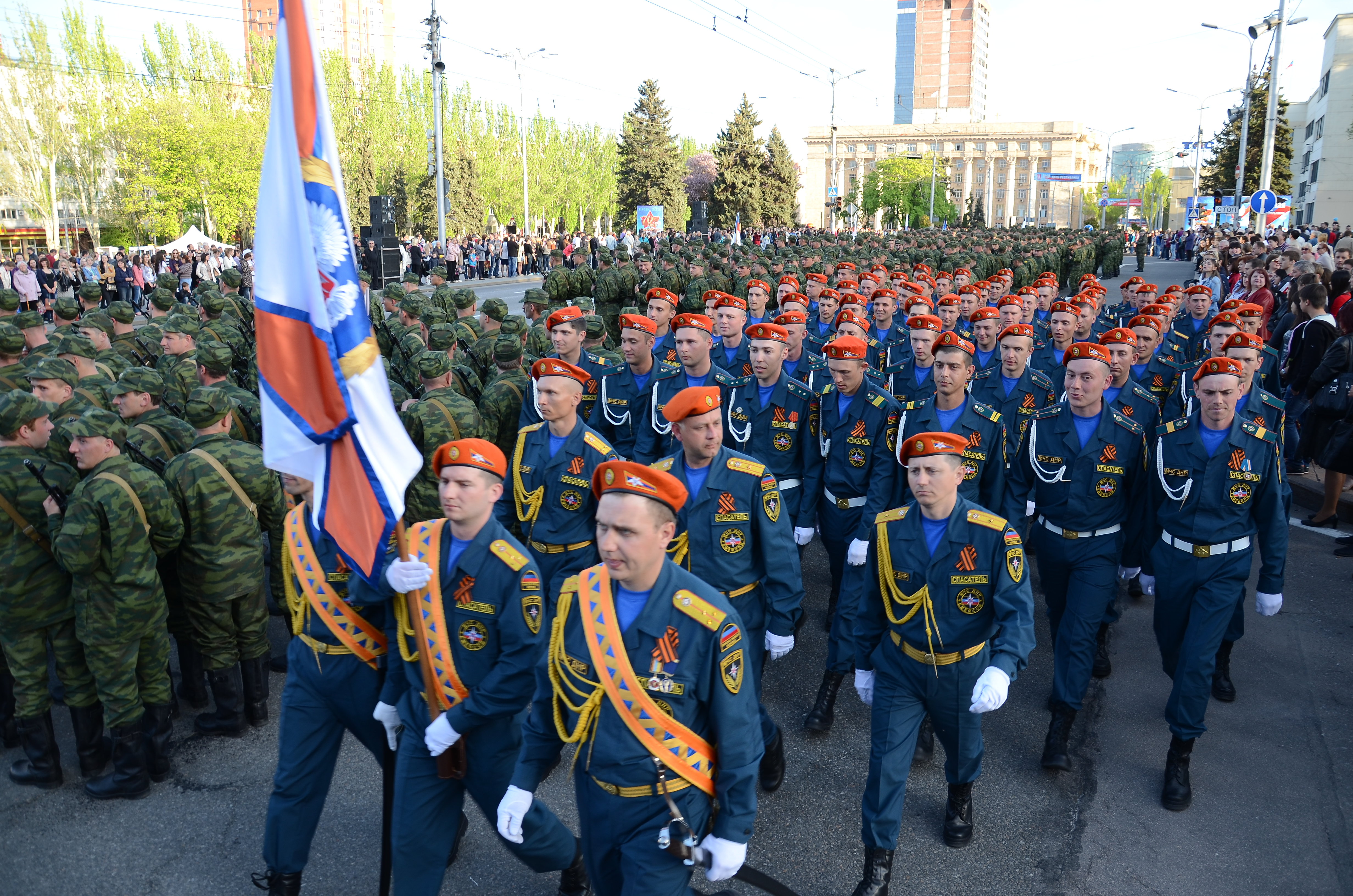 Репетиция парада в честь дня Победы в Донецке